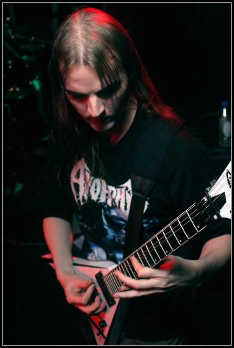 Foto der Band Necrophagist